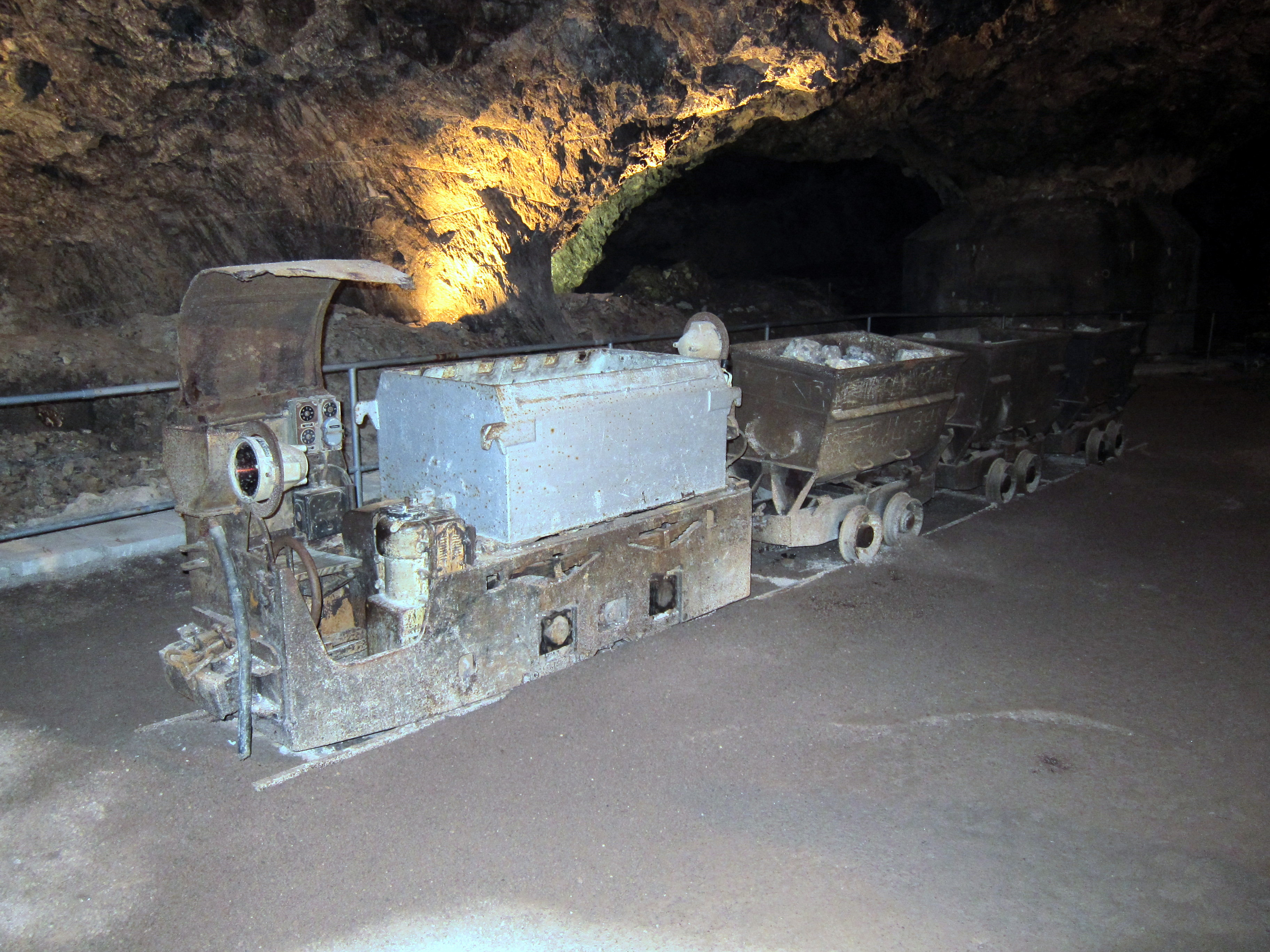 Marienglashöhle